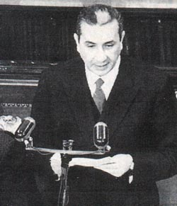 Moro presenta alla Camera dei deputati il primo governo di centro-sinistra (1963)